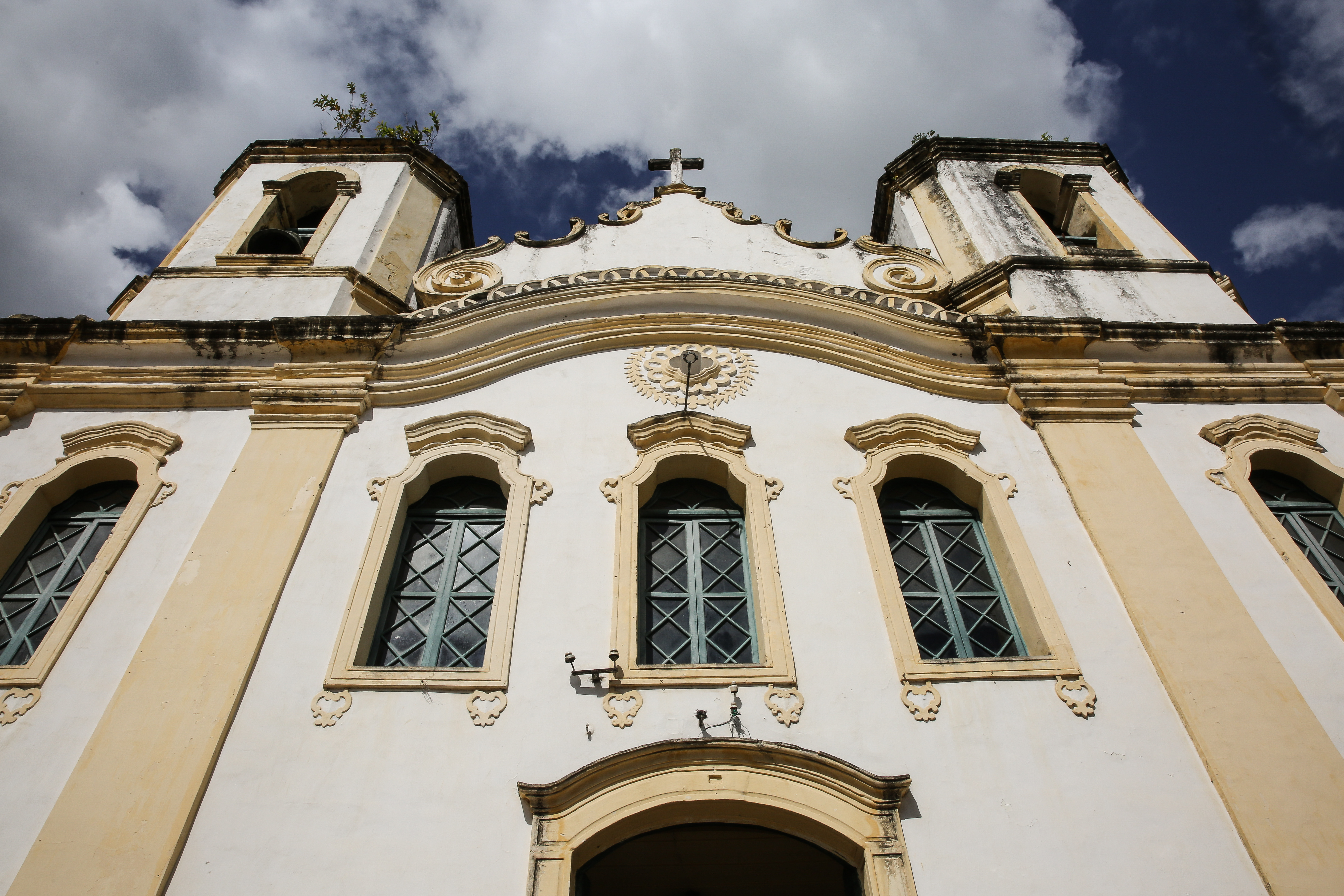 Além de participar do Circuito #CulturaGeraFuturo, o ministro também visitou nesta sexta-feira as igrejas de Nossa Senhora da Conceição da Comandaroba e Matriz Sagrado Coração de Jesus, na cidade histórica de Laranjeiras, e o Santuário da Divina Pastora, na cidade de mesmo nome, todas tombadas pelo Instituto do Patrimônio Histórico e Artístico Nacional (Iphan). Sá Leitão participou ainda da solenidade de comemoração de aniversário da Associação Comercial e Empresarial de Sergipe, que completa 146 anos neste sábado (26). 25.5.2018 Fotos: Clara Angeleas/MinC